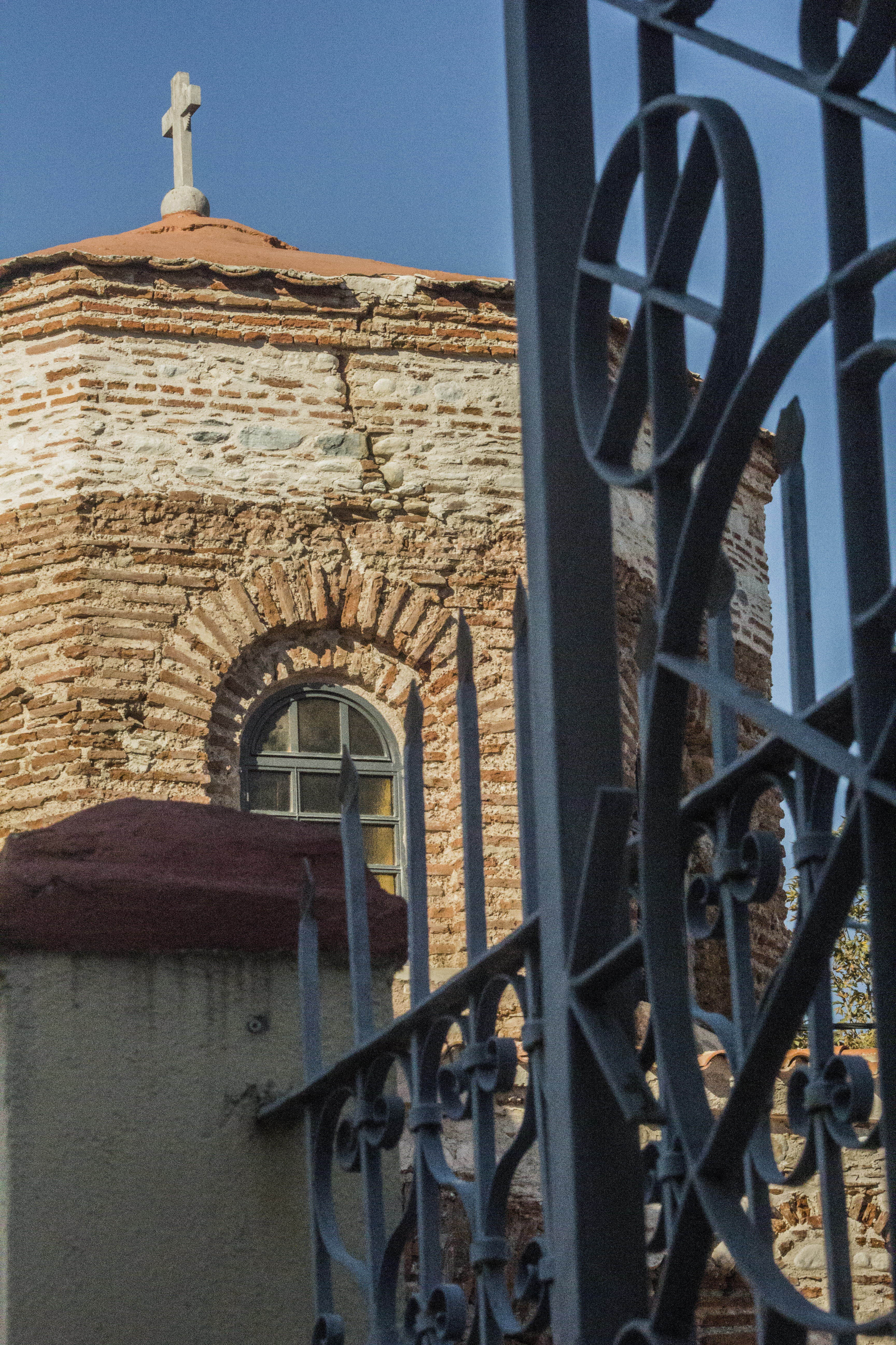 Ναός Αγίας Σοφίας Δράμας«Ναός Αγίας Σοφίας Δράμας»